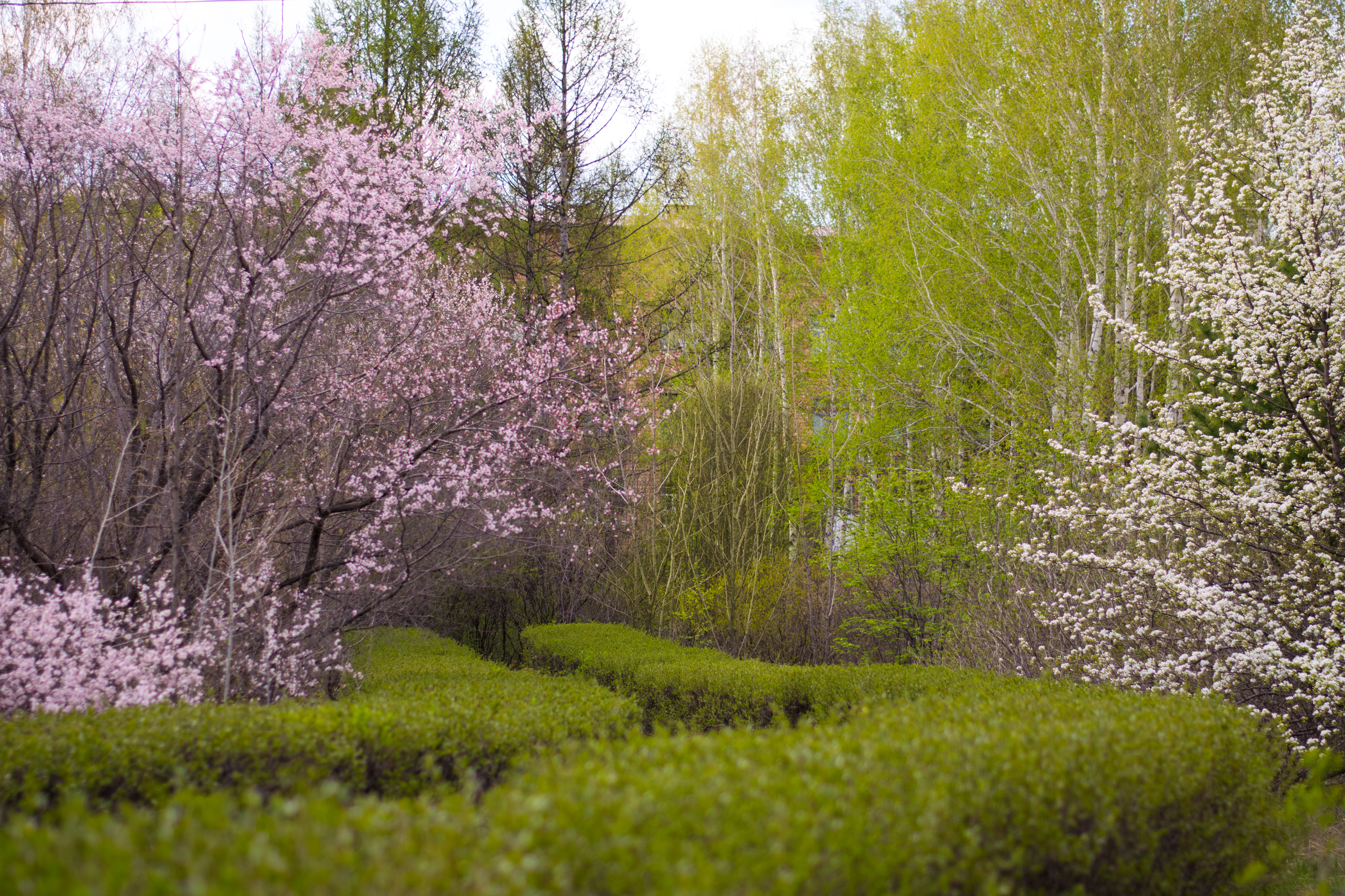 Дендрарий Института леса им.В.Н.Сукачева СО РАН, Красноярск Весна 12.05.2015 This image is related to the protected area of Russia number 2400126